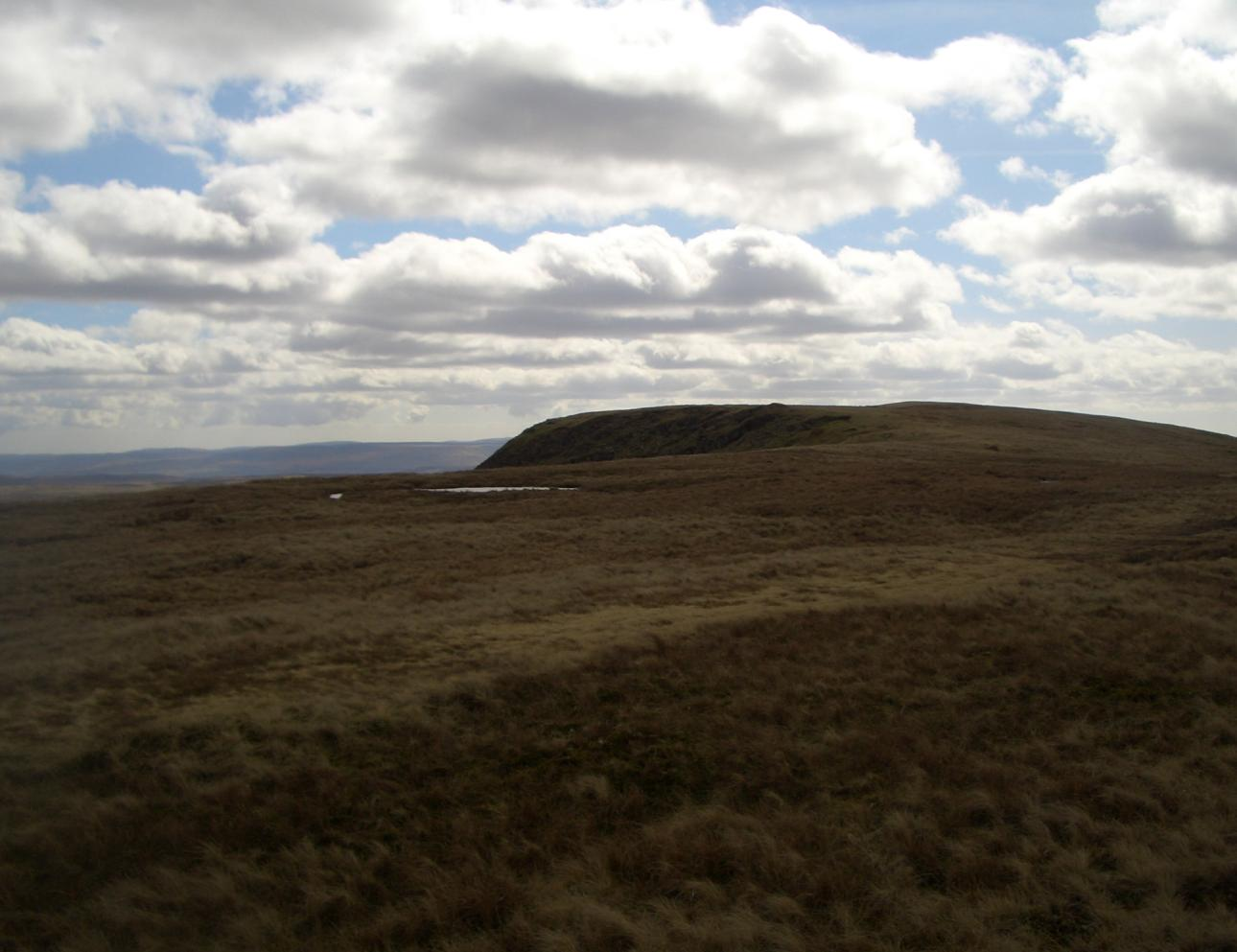 fan llia